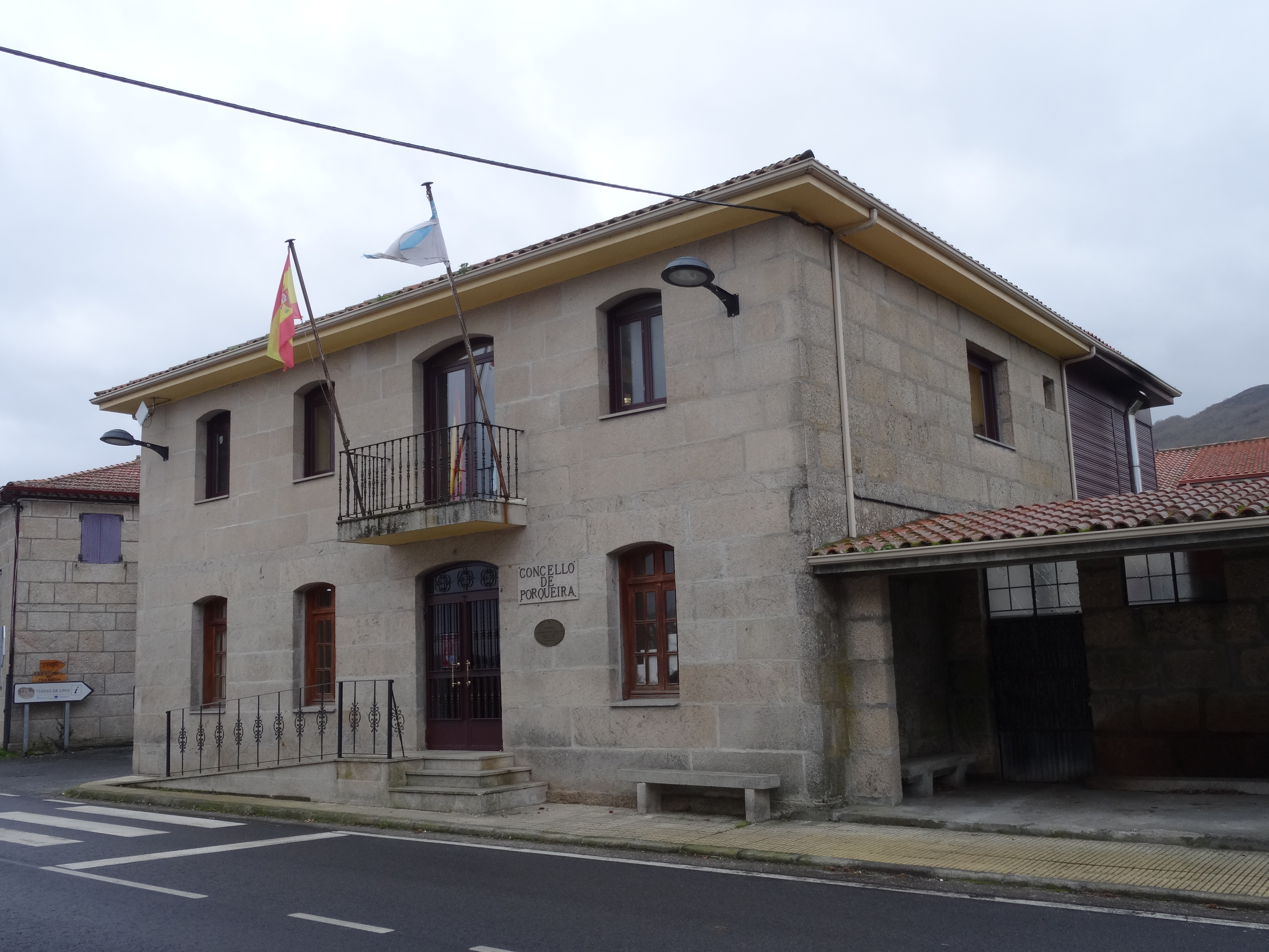 Casa do concello de Porqueira, Ourense.